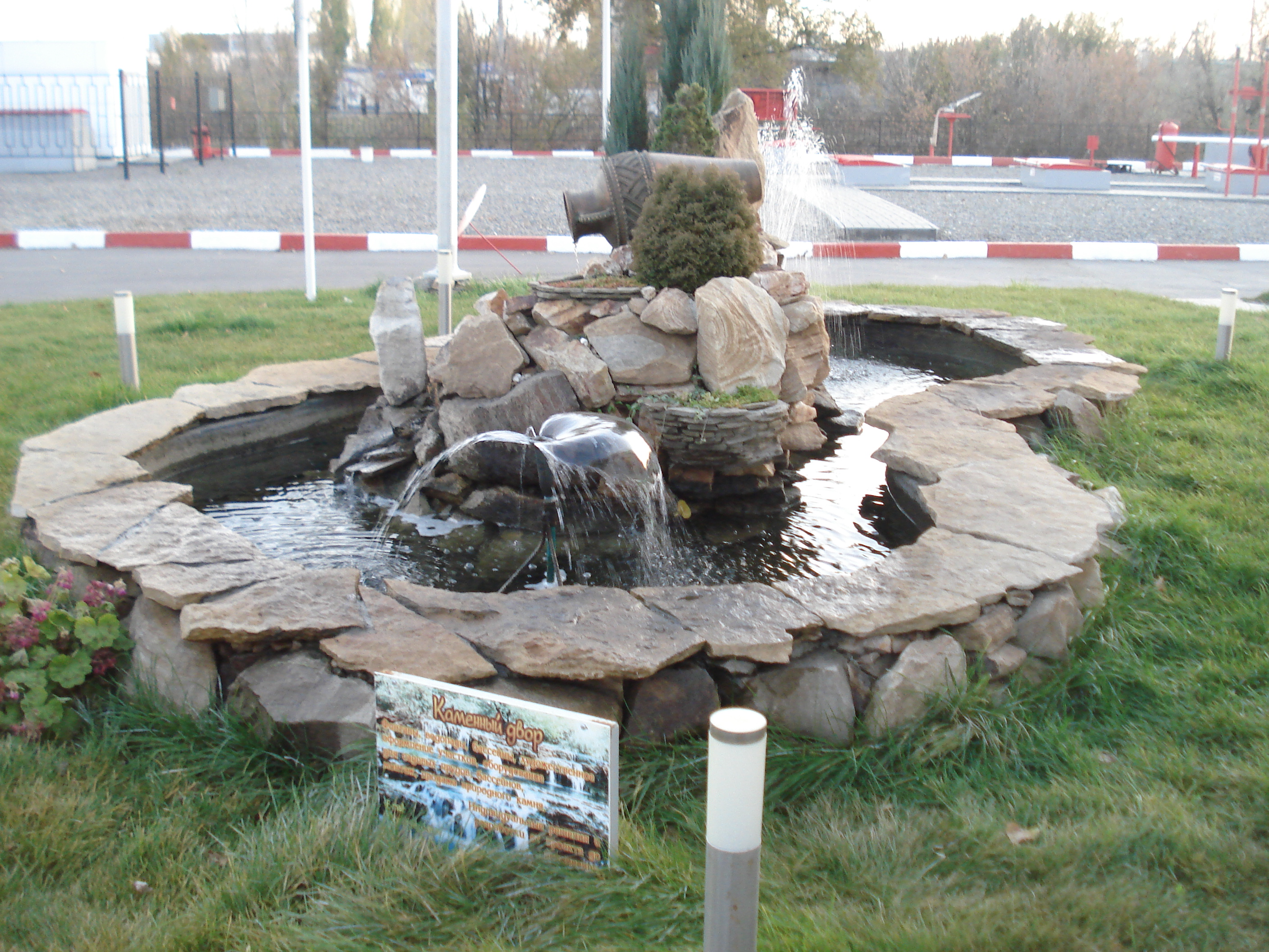 Мини-фонтан на АЗС "Лукойл" в Волгограде